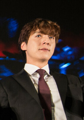 Тренер SK Telecom T1 KkOma на чемпионате мира по League of Legends 2015